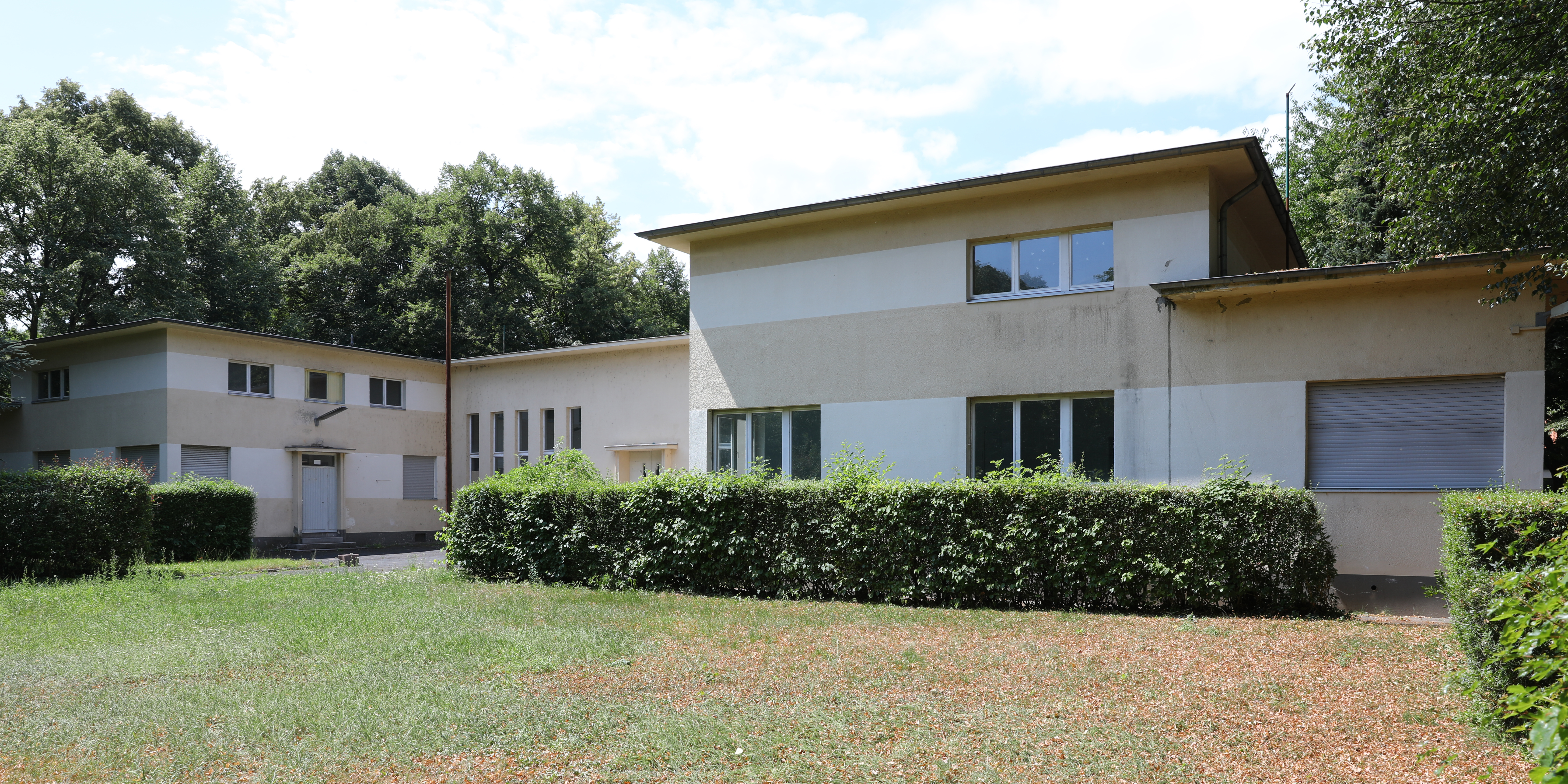 Ehemaliges Funkhaus der WERAG (Vorläufergesellschaft des WDR), Köln-Raderthal Hitzelerstraße 125, Englische Siedlung This is a photograph of an architectural monument.